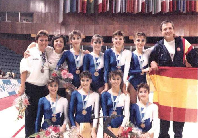 El conjunto español de gimnasia rítmica en el Mundial de Varna en 1987. De pie, de izquierda a derecha: Ana Roncero (entranadora), Emilia Boneva (seleccionadora), Astrid Sánchez, Mari Carmen Moreno, Elena Velasco, Ana Mª Martínez y el coreógrafo Georgi Neykov. Abajo, de izquierda a derecha: Natalia Marín, Marisa Centeno, Marta Pardós y Ana Carlota de la Fuente.